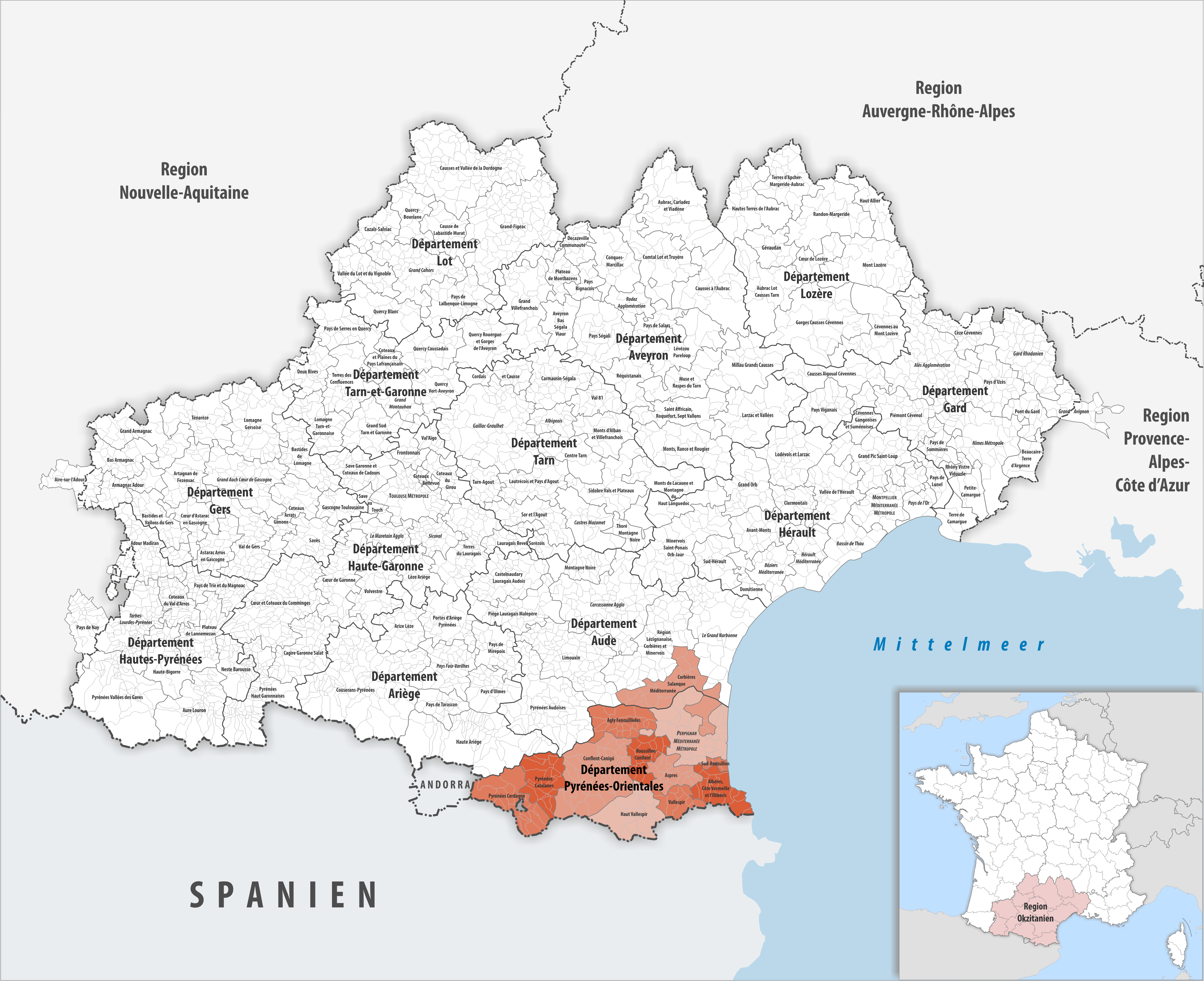 Gemeindeverbände im Département Pyrénées-Orientales